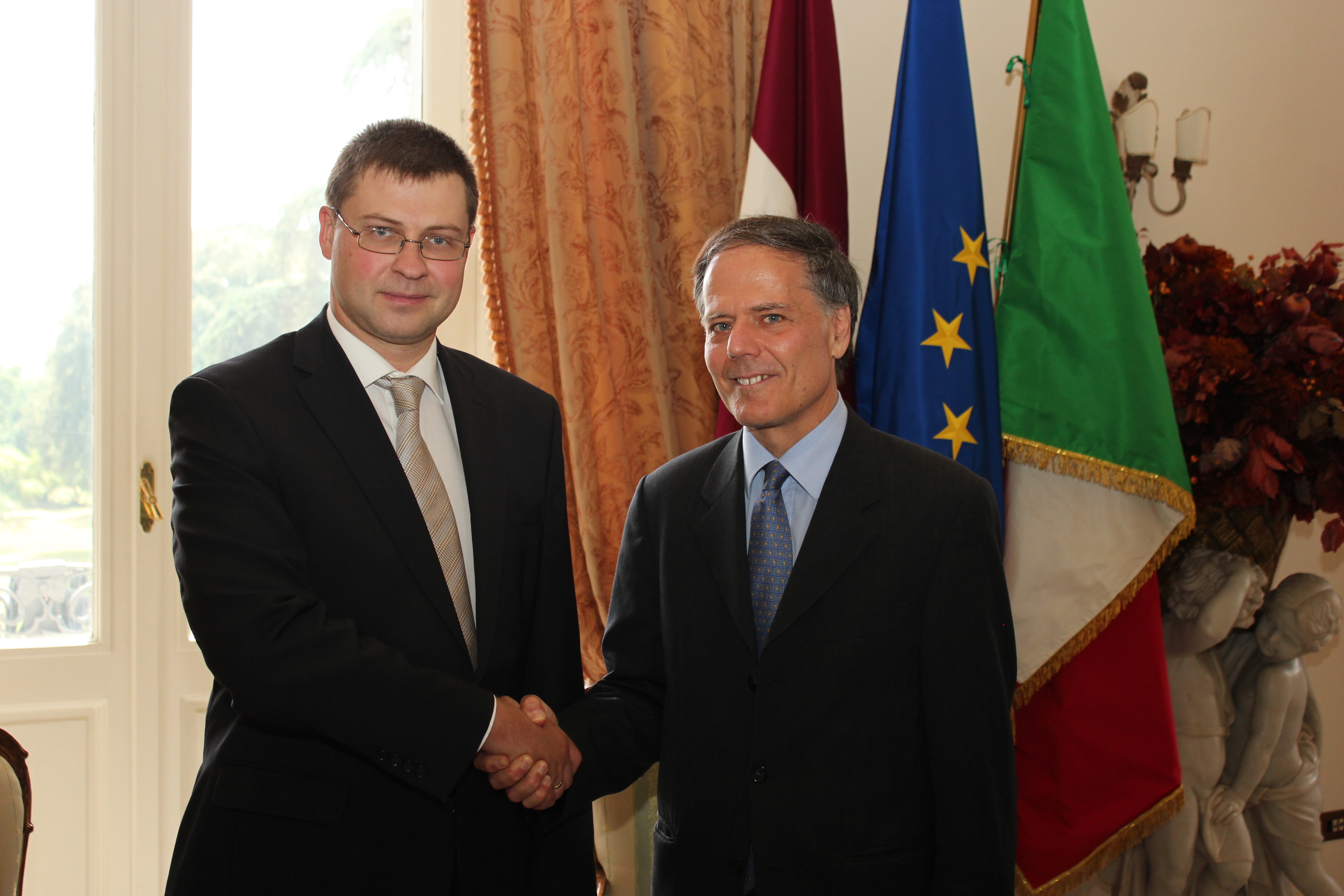 Ministru prezidents Valdis Dombrovskis Romā tiekas ar Itālijas Eiropas lietu ministru Enco Moavero (Enzo Moavero)